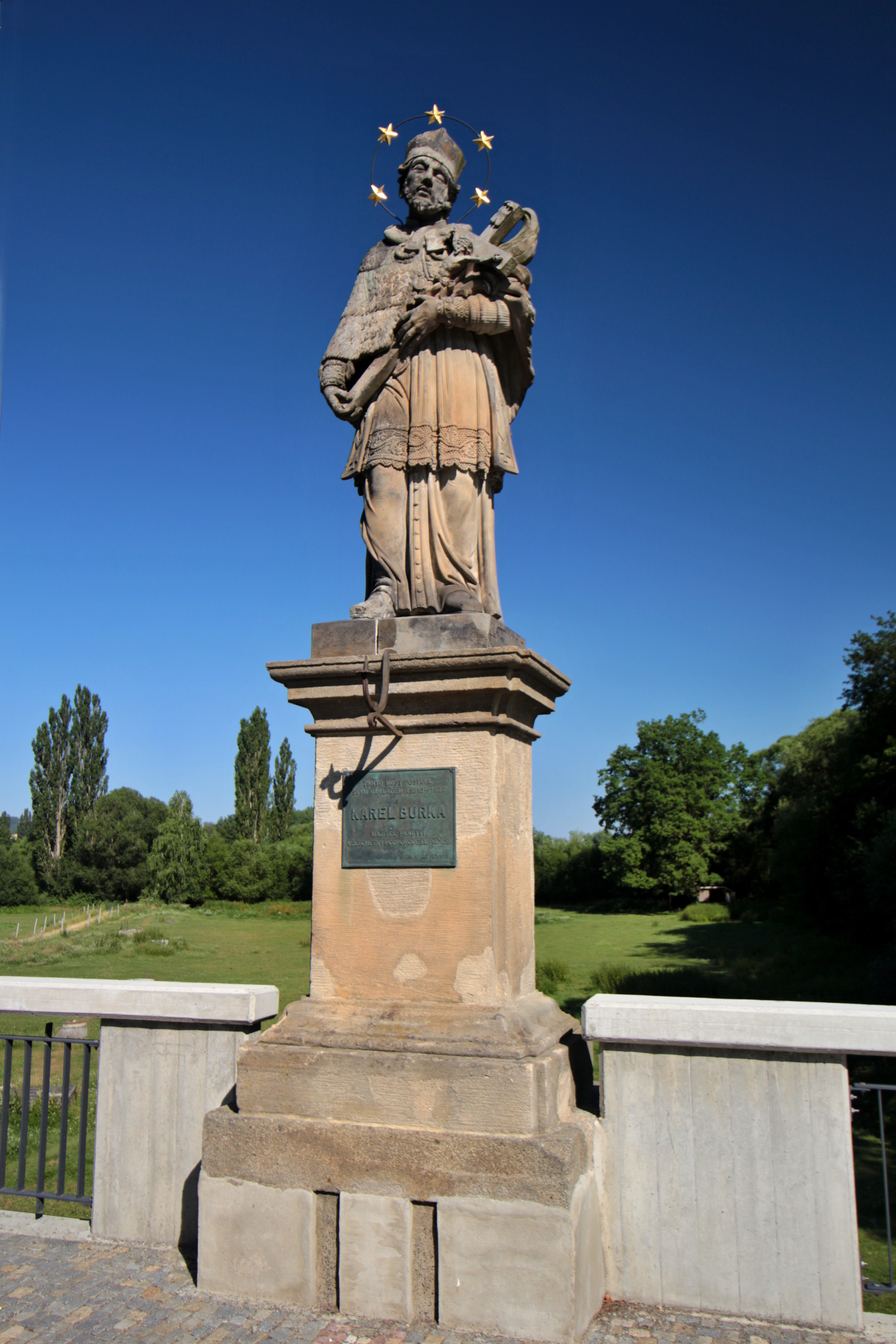 Sedlec-Prčice Burkův most, socha sv. Jana